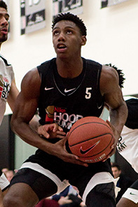 18 hsum barrett rj practice 800jpg